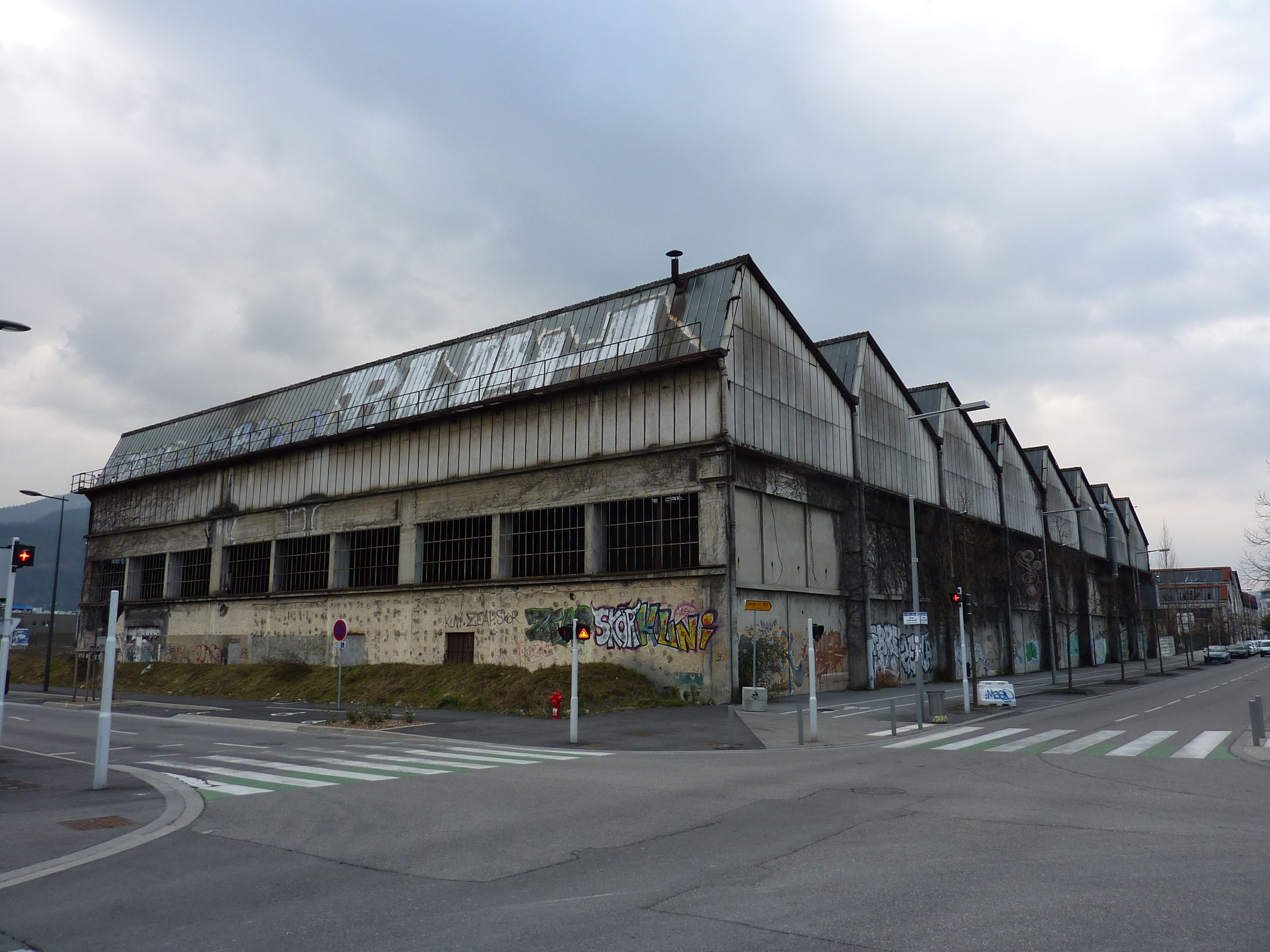 Anciennes usines Neyrpic à Saint-Martin-d'Hères